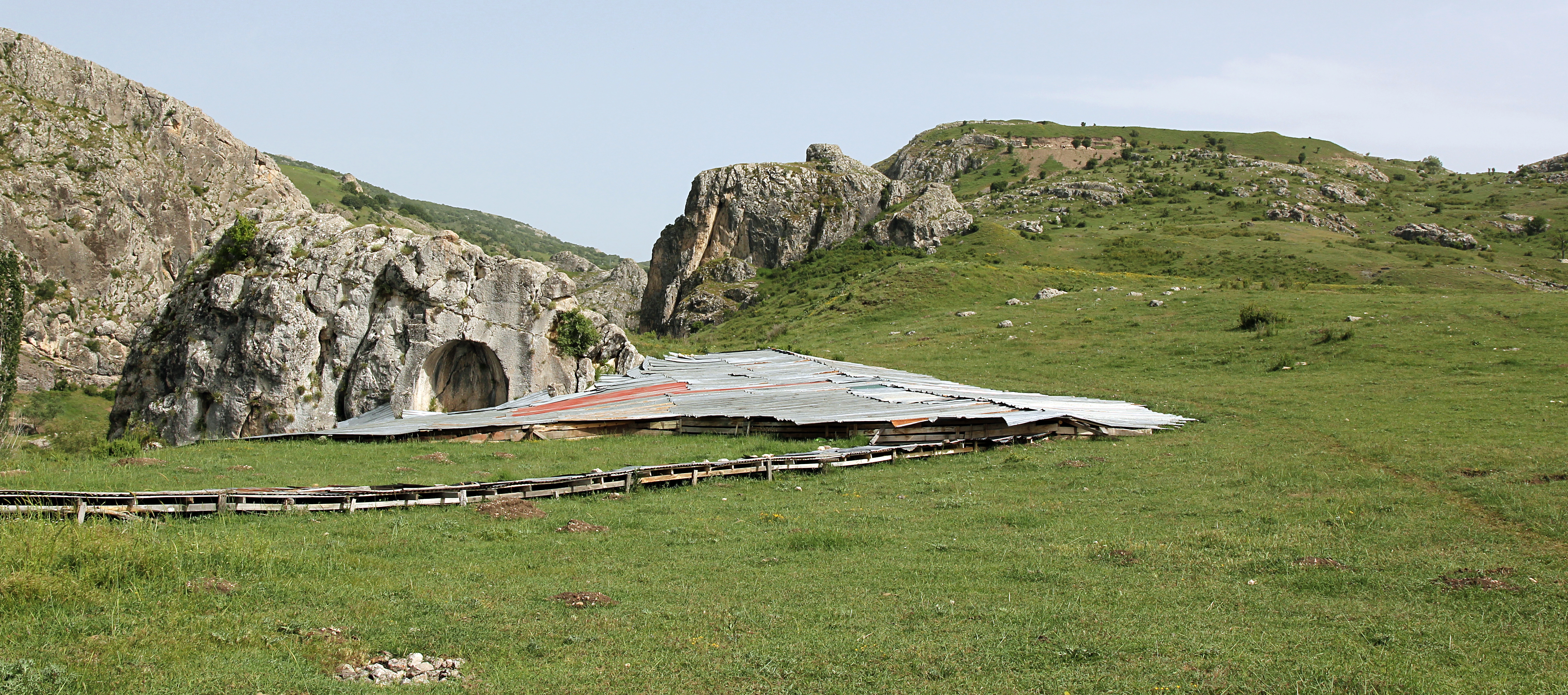 Ḫattuša, hethitische Hauptstadt bei Boğazkale, Zentraltürkei, Mihraplıkaya, im Hintergrund Ambarlıkaya